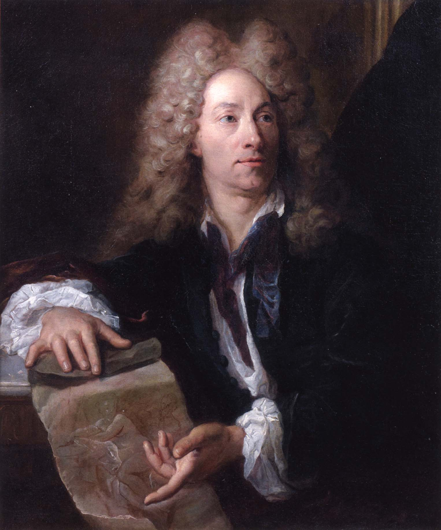 Portrait of the painter Louis de Boullogne (1654-1733)